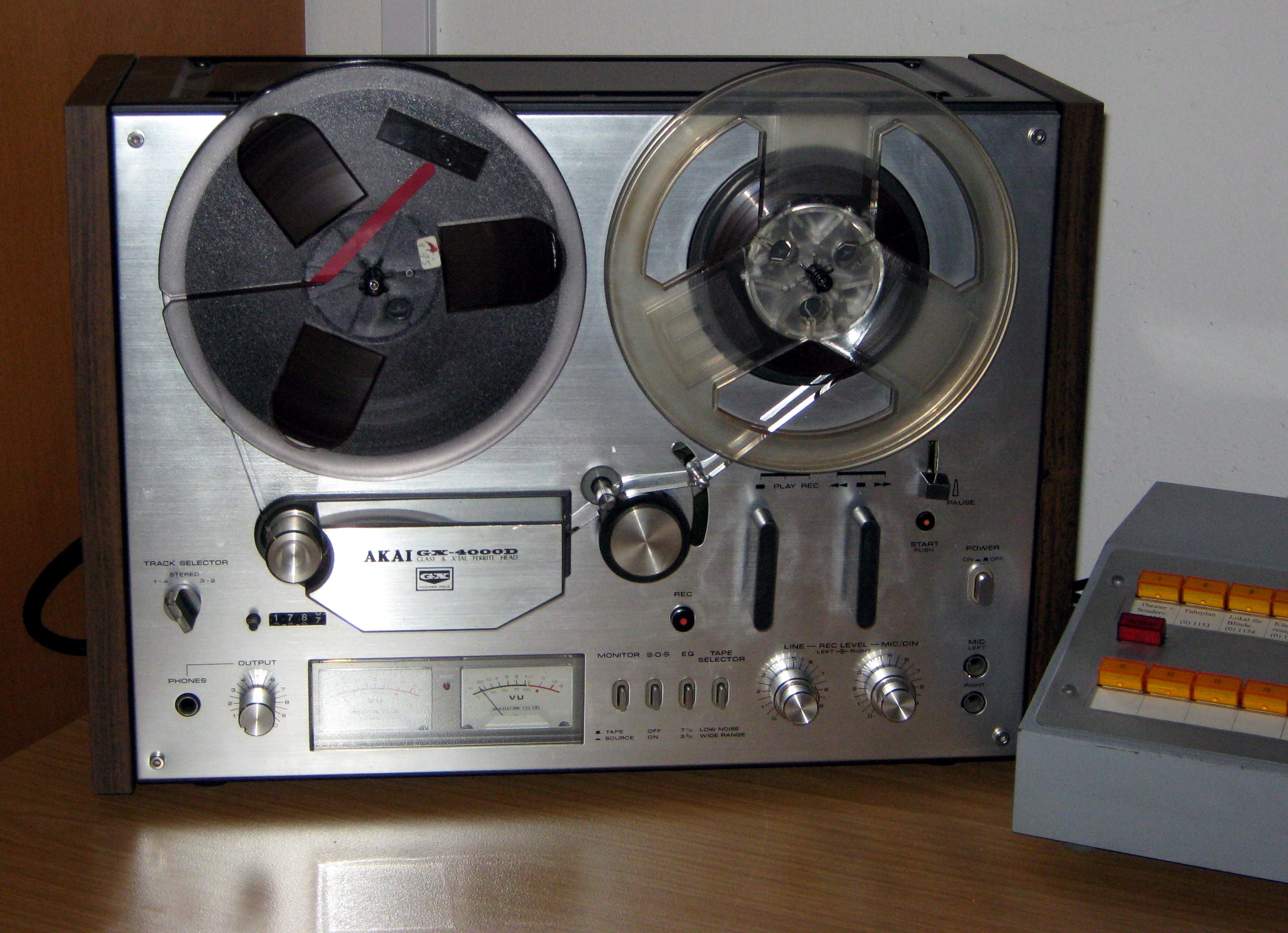 AKAI GX 4000 D (Baujahr ungefähr Ende der 1970er Jahre) im Fernmeldemuseum Aachen, weil das Tonbandgerät für die Aufzeichnung von Ansagen (Kinoprogramm, Wetter, usw.) genutzt wurde